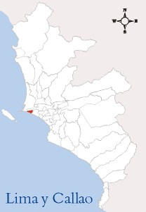 Localización del distrito de La Perla Esta imagen ha sido elaborada por --Edgardo Reyes 18:34 9 mar, 2005 (CET) Categoría:Mapas del Perú (imagen)